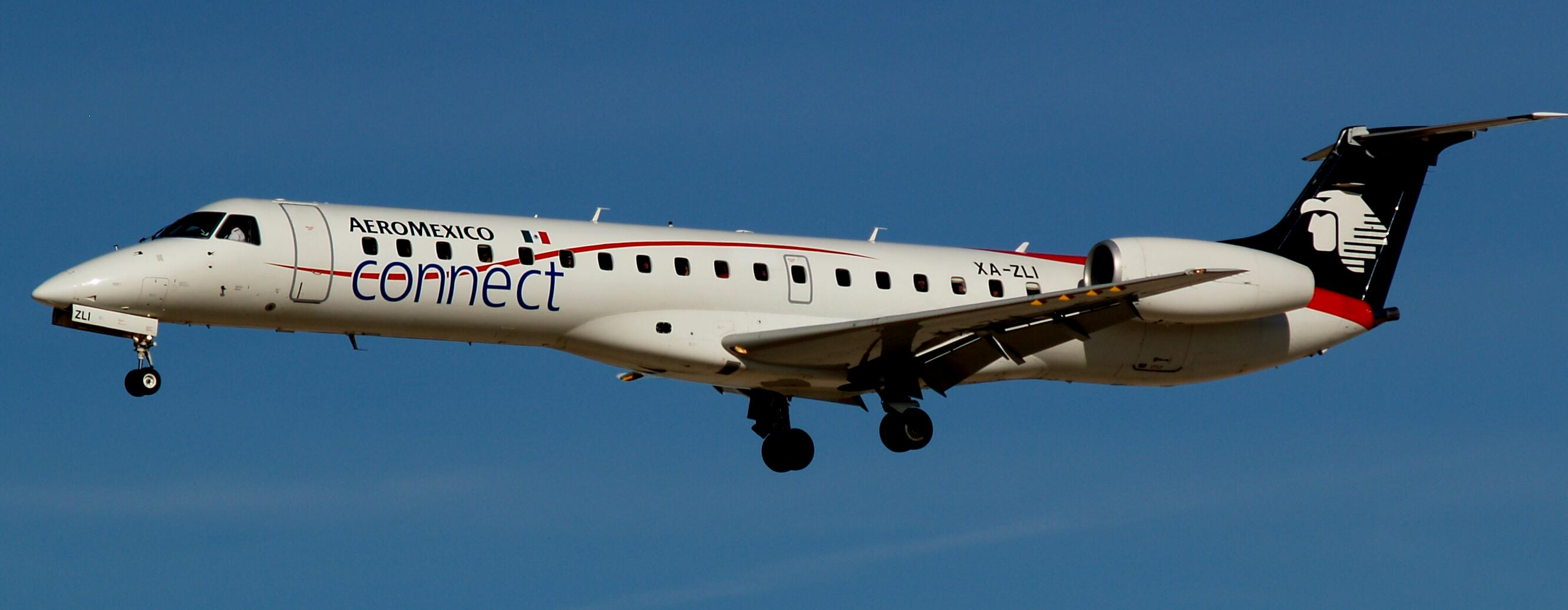 AeroMexico Embraer ERJ-145LU (msn 145420)